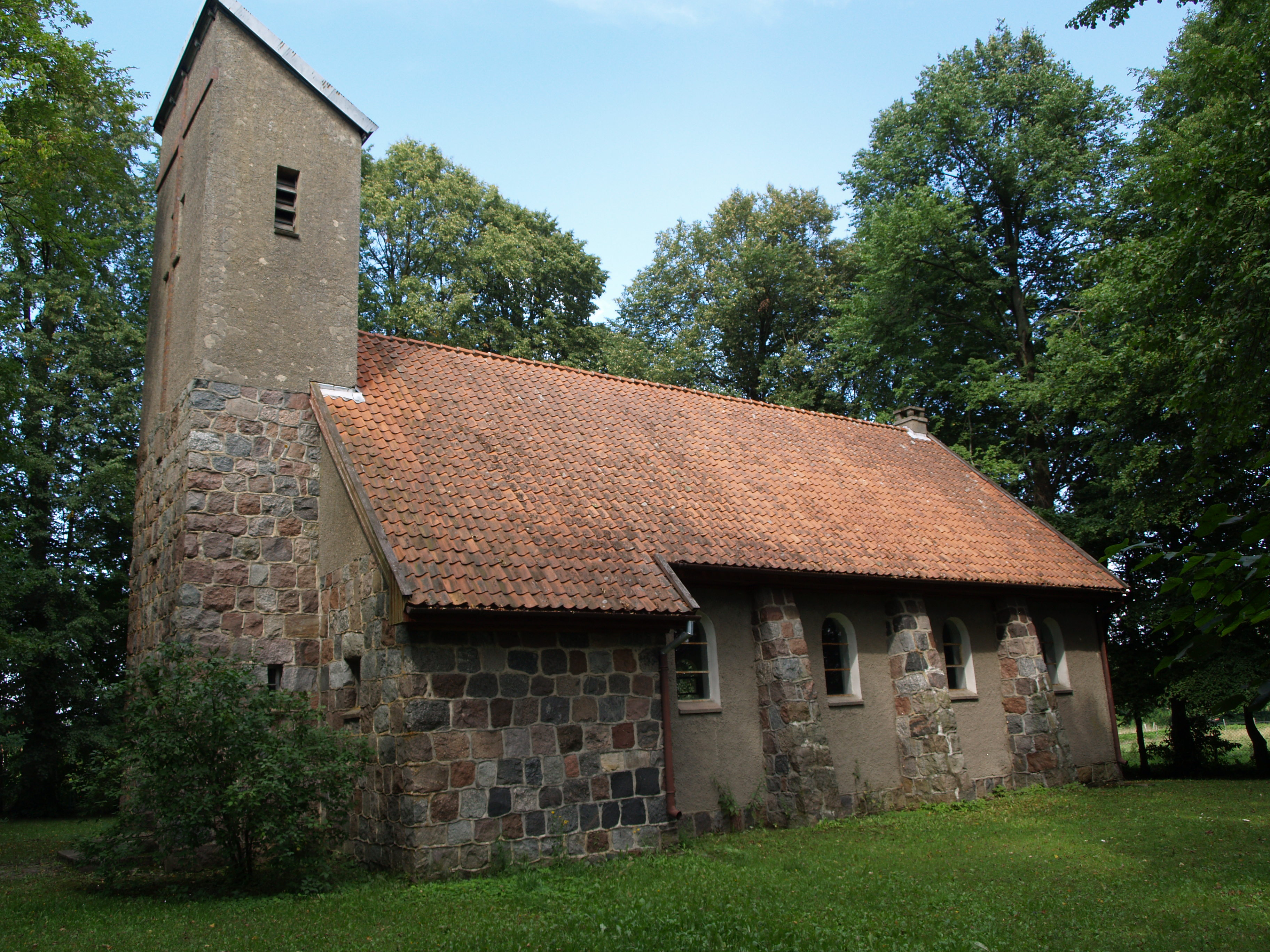 Heutige Evangelische Kirche zu Srokowo, Sonntags findet auch ein Gottesdienst statt.